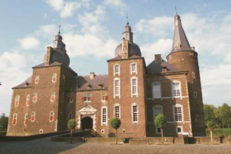 Foto van het Kasteel in hoensbroek (Limburg)